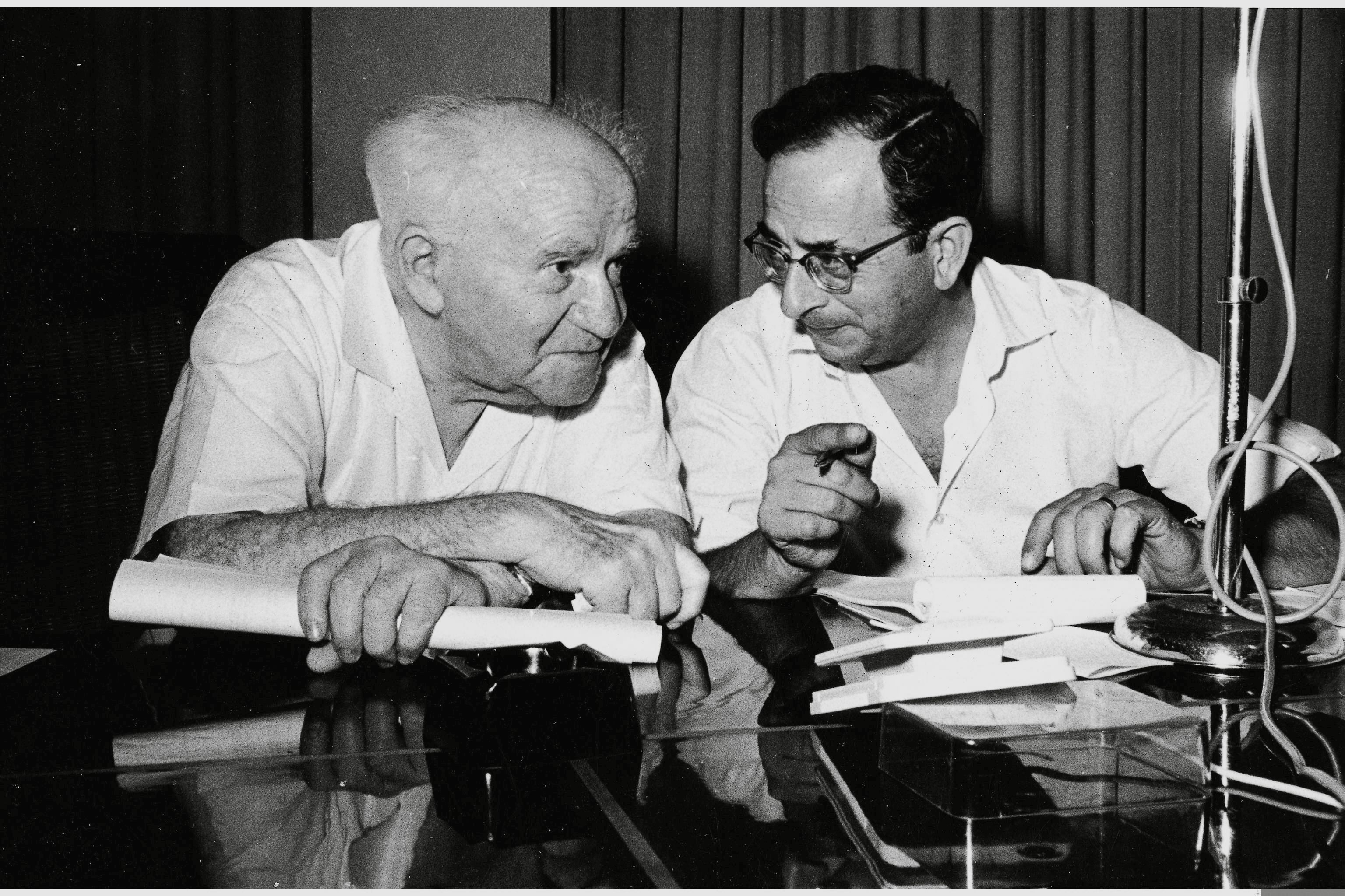 יצחק נבון עם ראש הממשלה דוד בן-גוריון בלשכתו